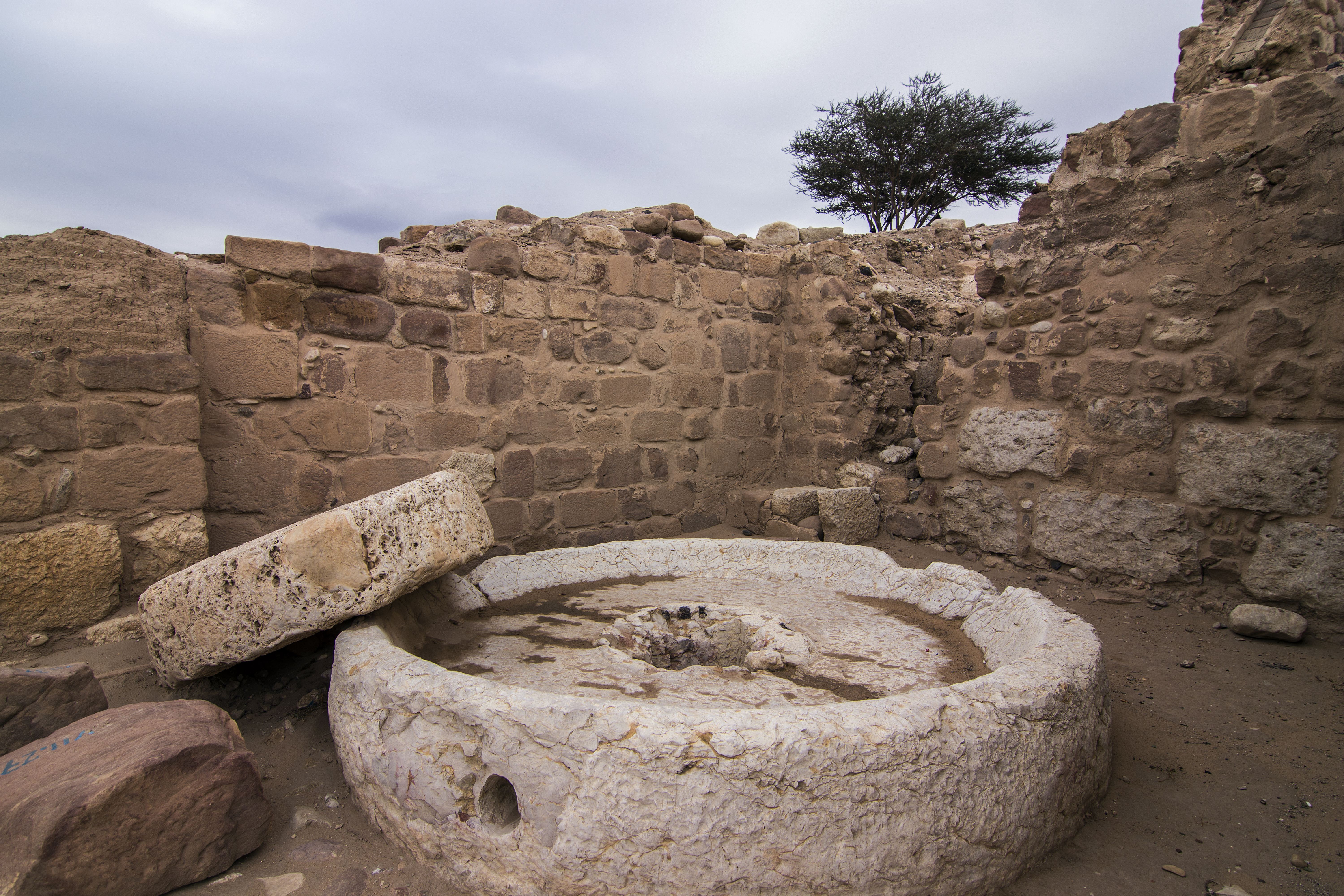 طواحين السكر جنوب الأردن محافظة الطفيلة